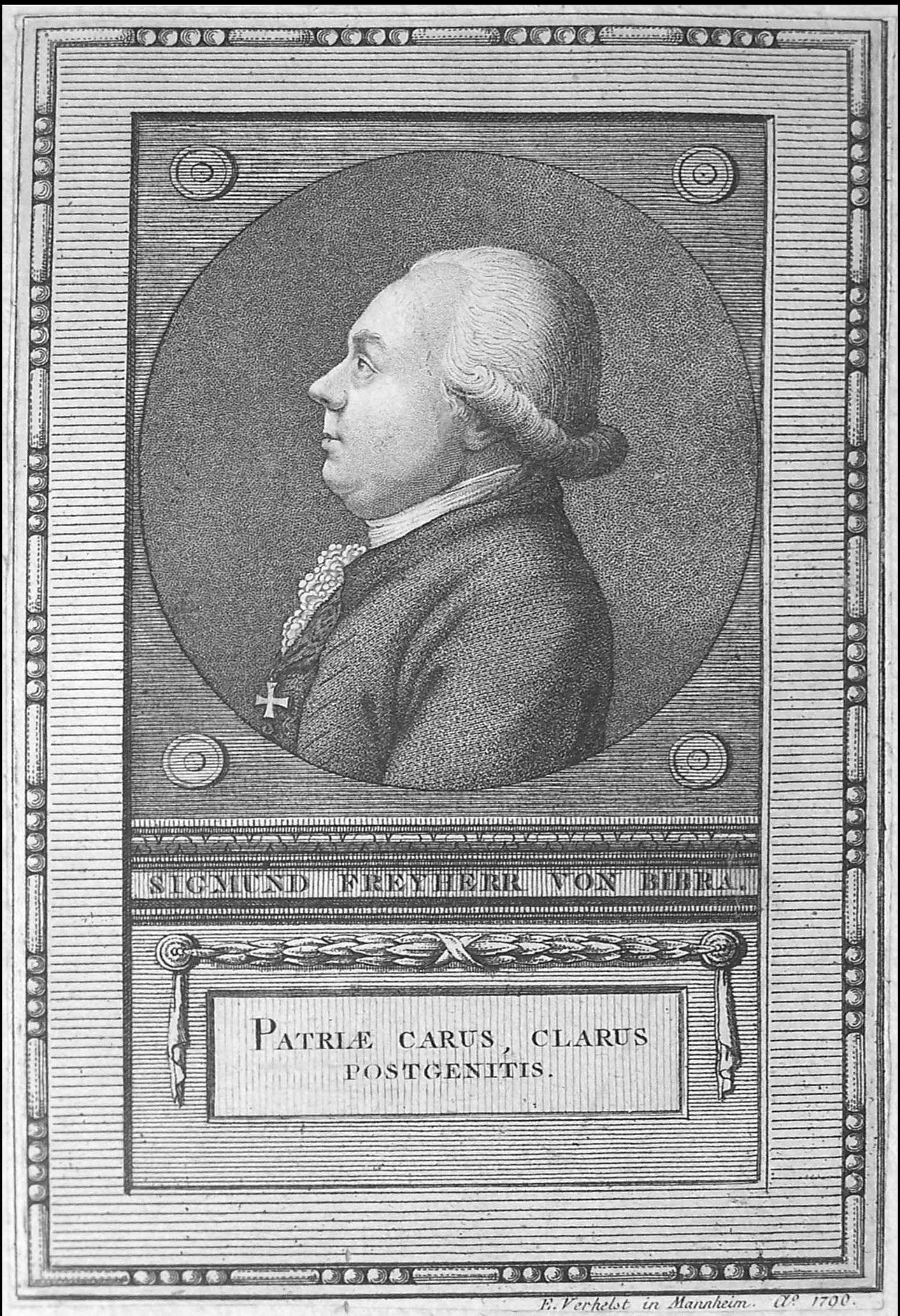 Portrait of Sigmund von Bibra (1750-1803)